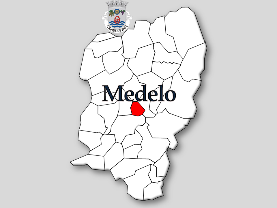 Censos 1864/2011